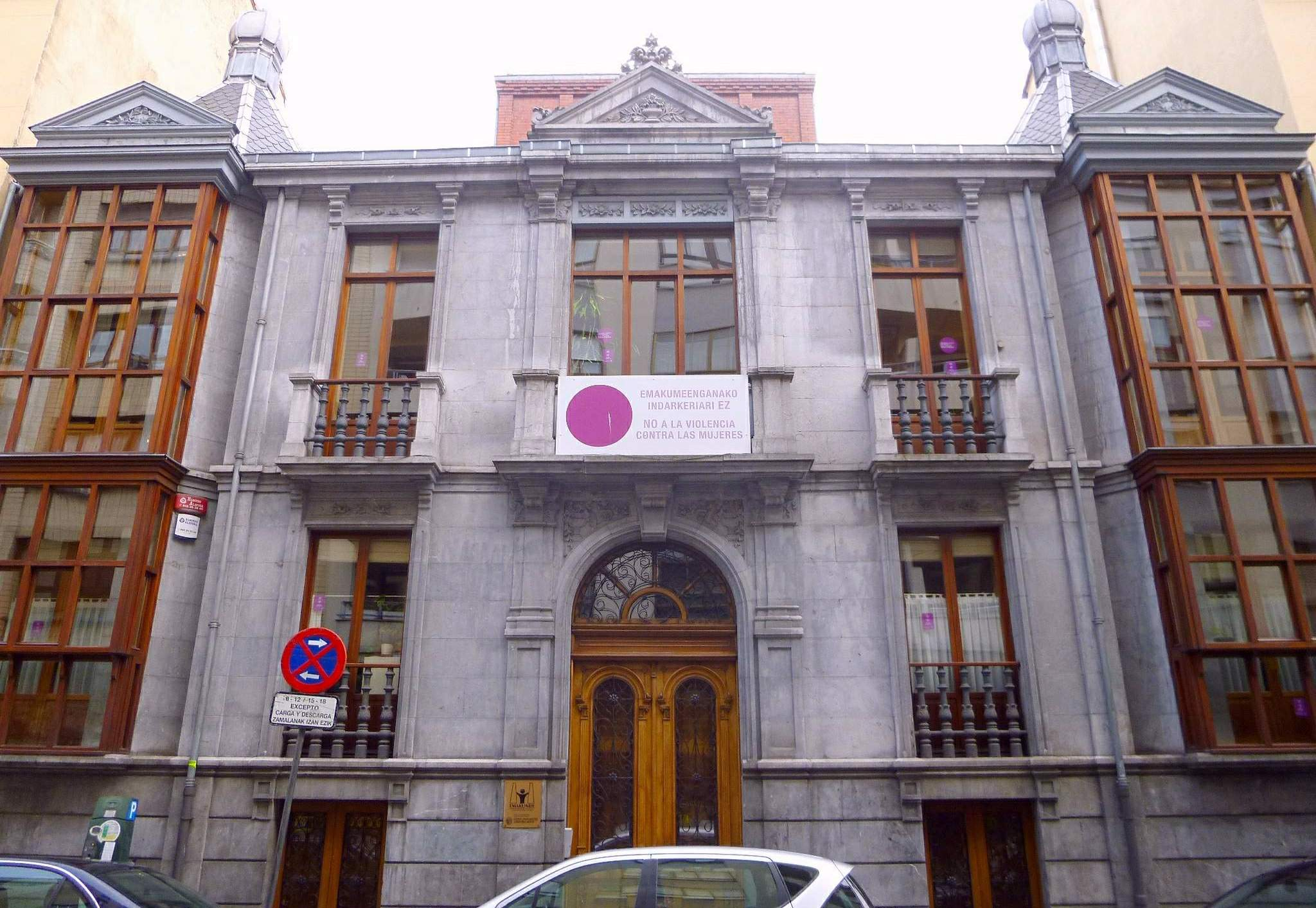 Vitoria - Calle Manuel Iradier, sede de Emakunde (Instituto Vasco de la Mujer)